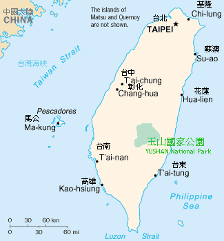 Taiwan Yushan National Park Drawing map by prattflora.